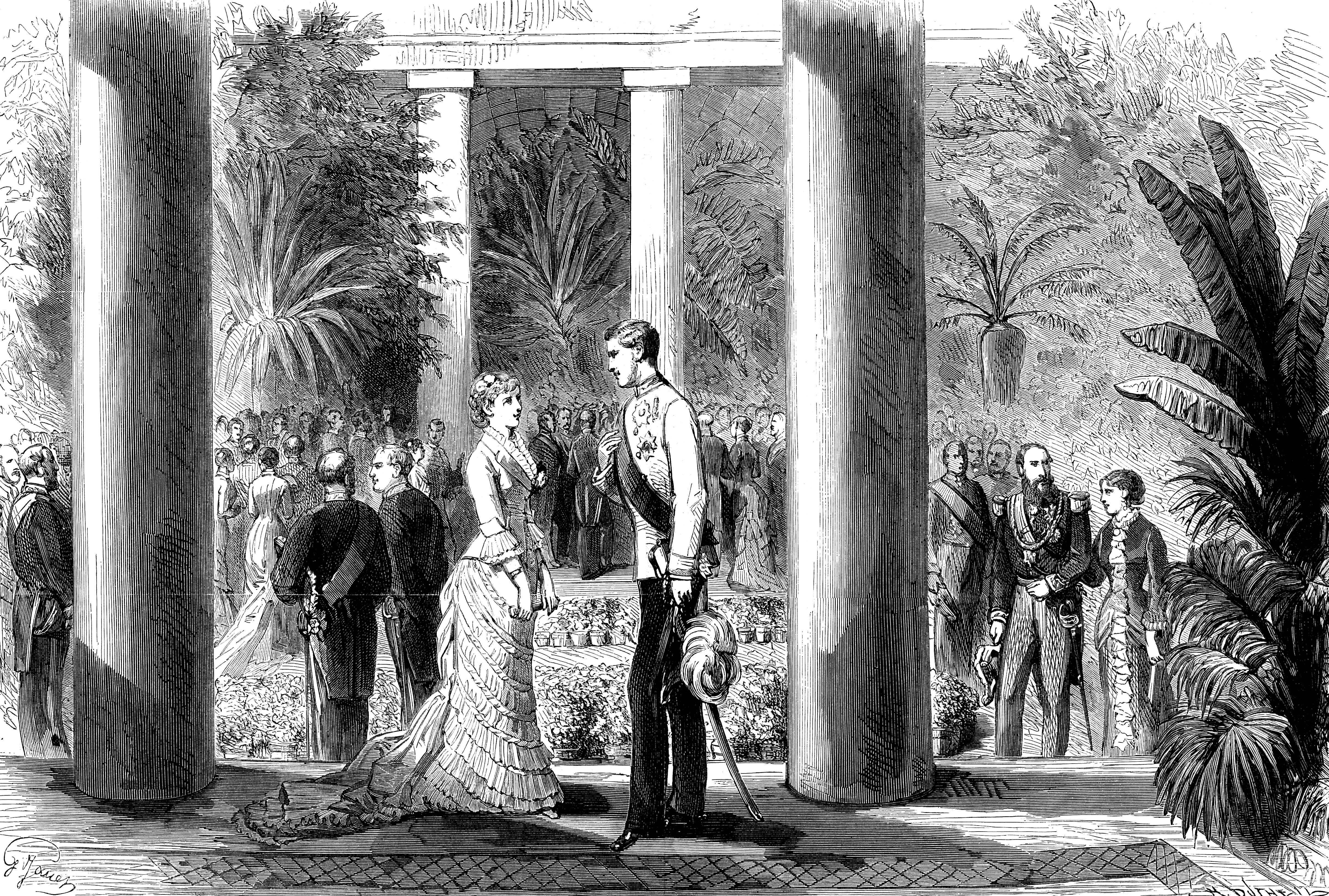 Réception lors des fiançailles de la princesse Stéphanie de Belgique avec l’archiduc Rodolphe d’Autriche, château de Laeken, le 7 mars 1880. — La réception à lieu dans le Jardin d’hiver à l’occasion des fiançailles de Stéphanie et Rodolphe, mais aussi de l’inauguration du Jardin d’hiver des serres du château de Laeken.